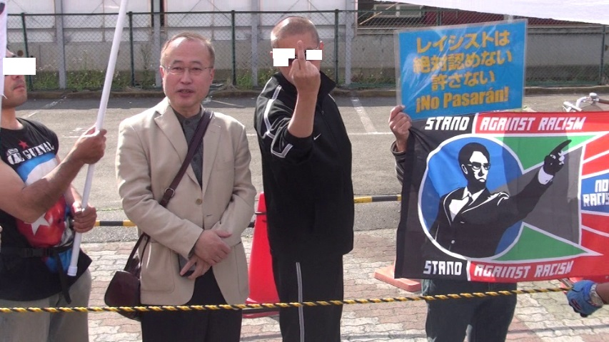 行動する保守のデモに対峙する有田（2013年5月12日川崎でのデモ行進で撮影）